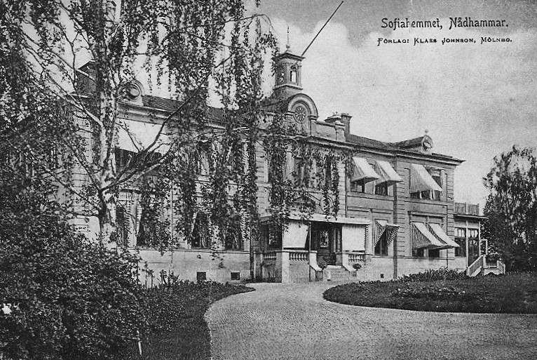 Nådhammar, byggt 1875, under den tid Sofiahemmet disponerqade huvudbyggnaden 1897-1907.